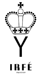 sigle de l'atelier de grande couture IRFE rue d'Obligado maintenant rue d'Argentine paris 16è